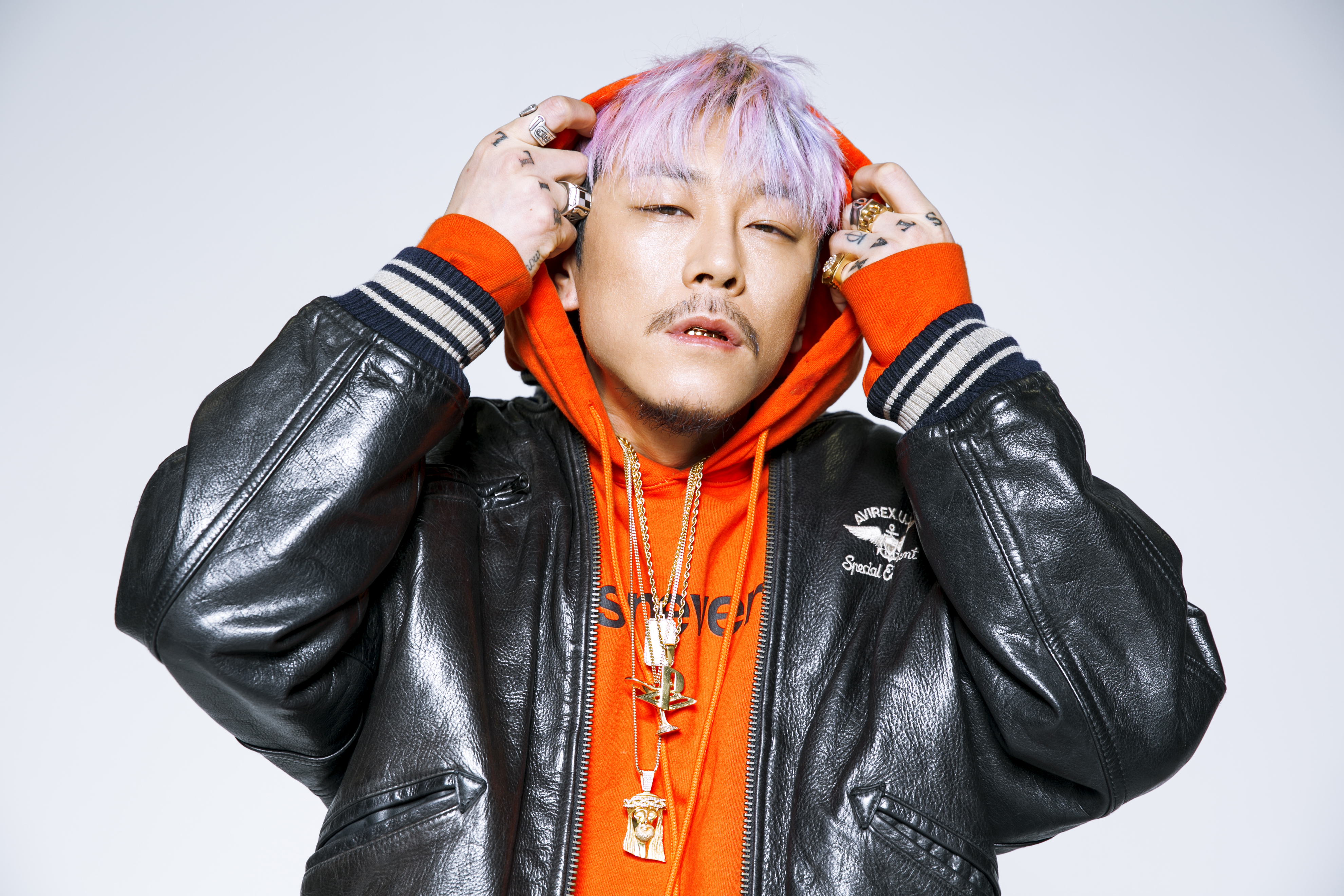 2017 빌스택스